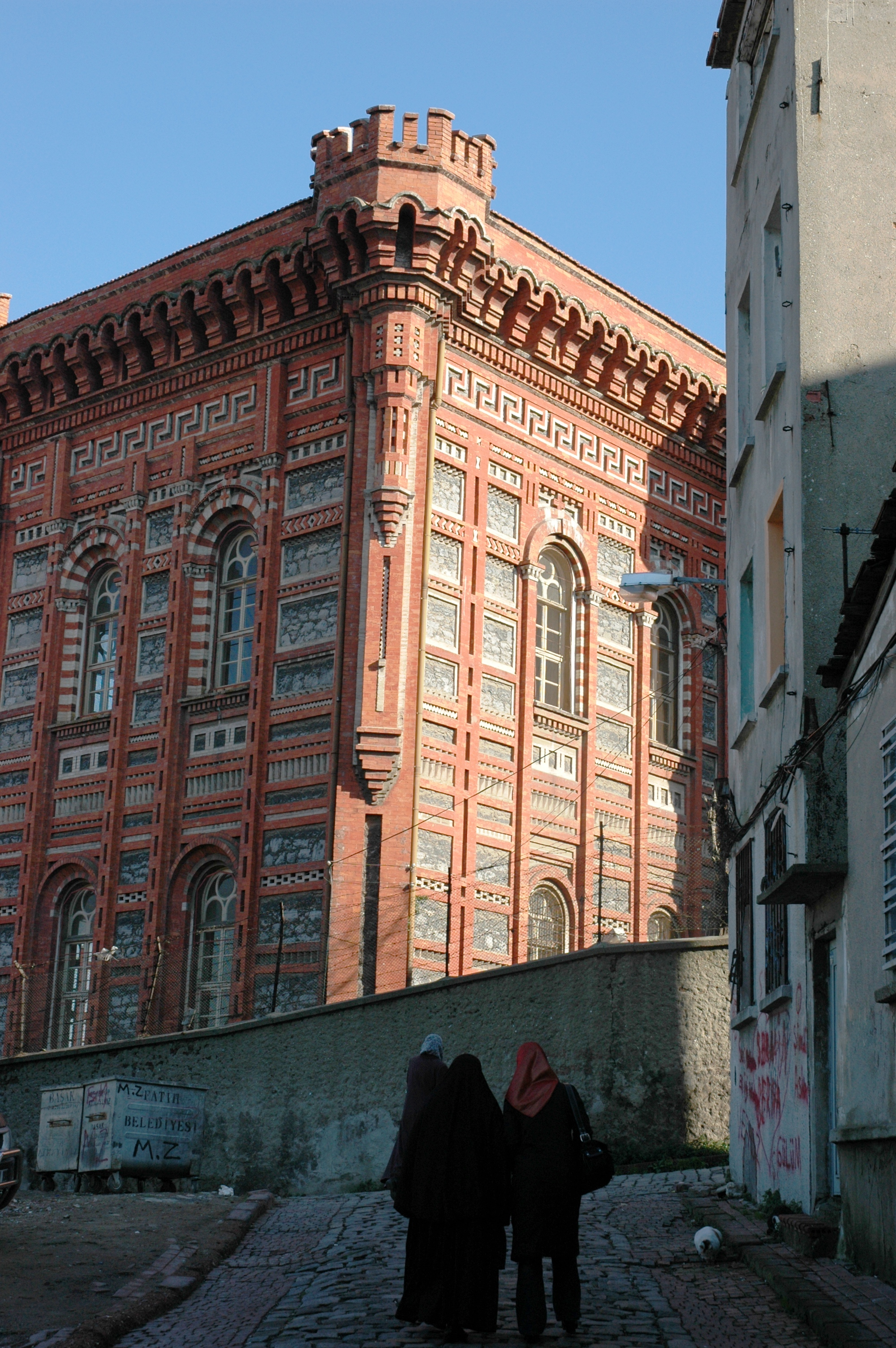 Universitat ortodoxa grega de Fener